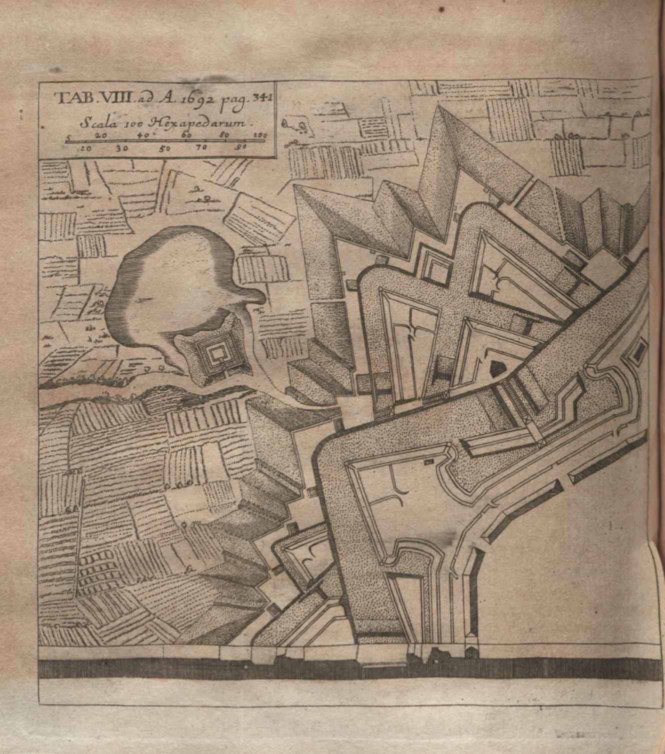 Illustration